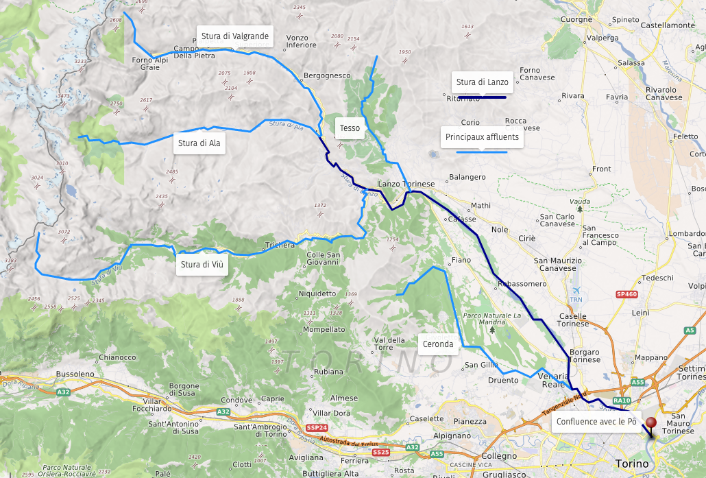 Carte établie d'après openstreetmap This map may be incomplete, and may contain errors. Don't rely solely on it for navigation.